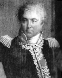 Jacques-Antoine Chambarlhac de Laubespin (1754-1826), général de division de la Révolution française et de l'Empire.